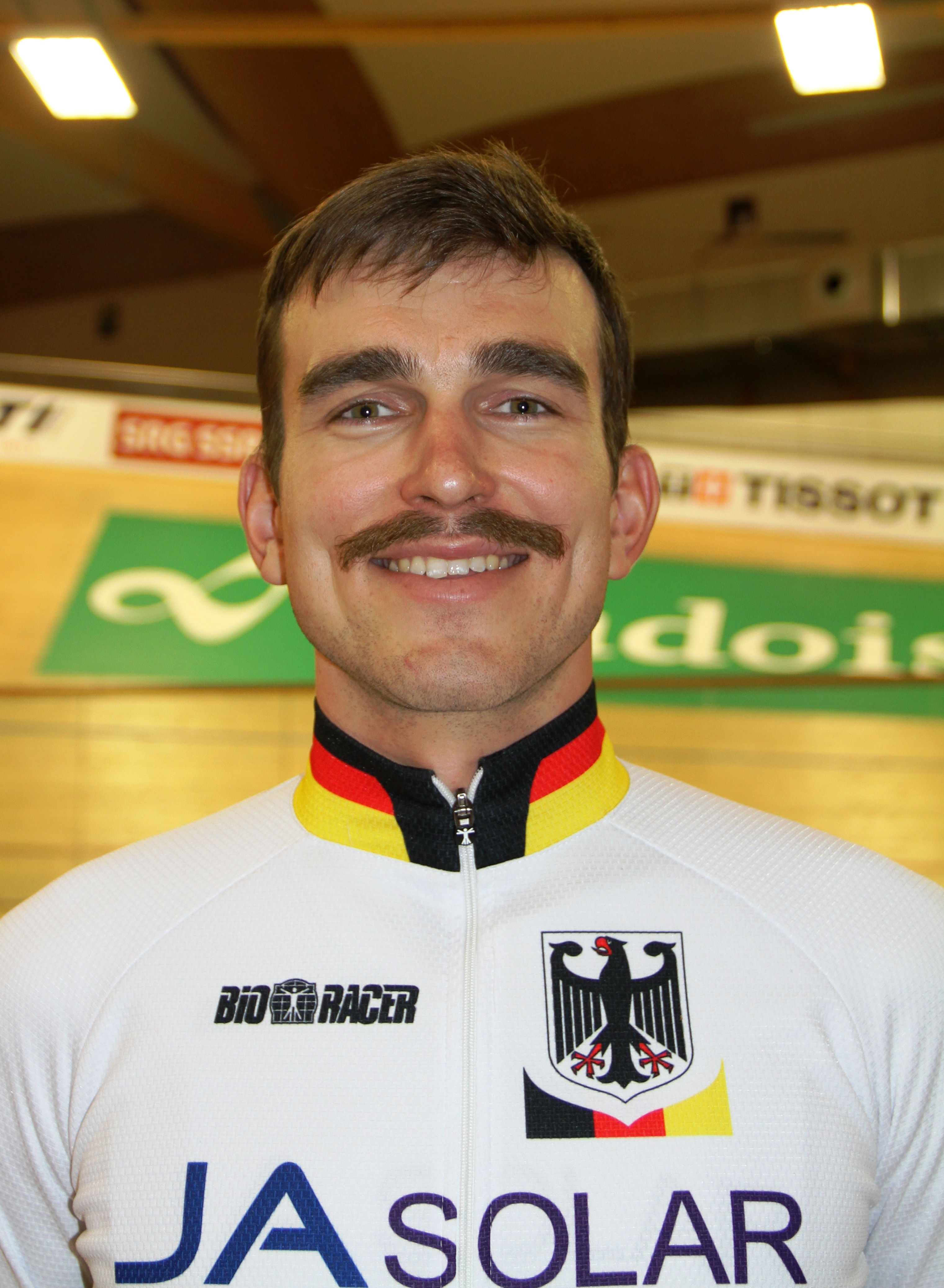 Hennning Bommel, deutscher Radsportler The making of this document was supported by the Community-Budget of Wikimedia Germany.